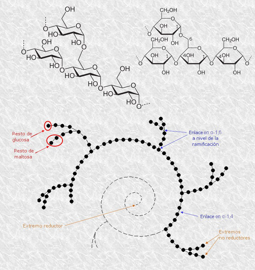 Estructura de la amilopectina. Varias visiones